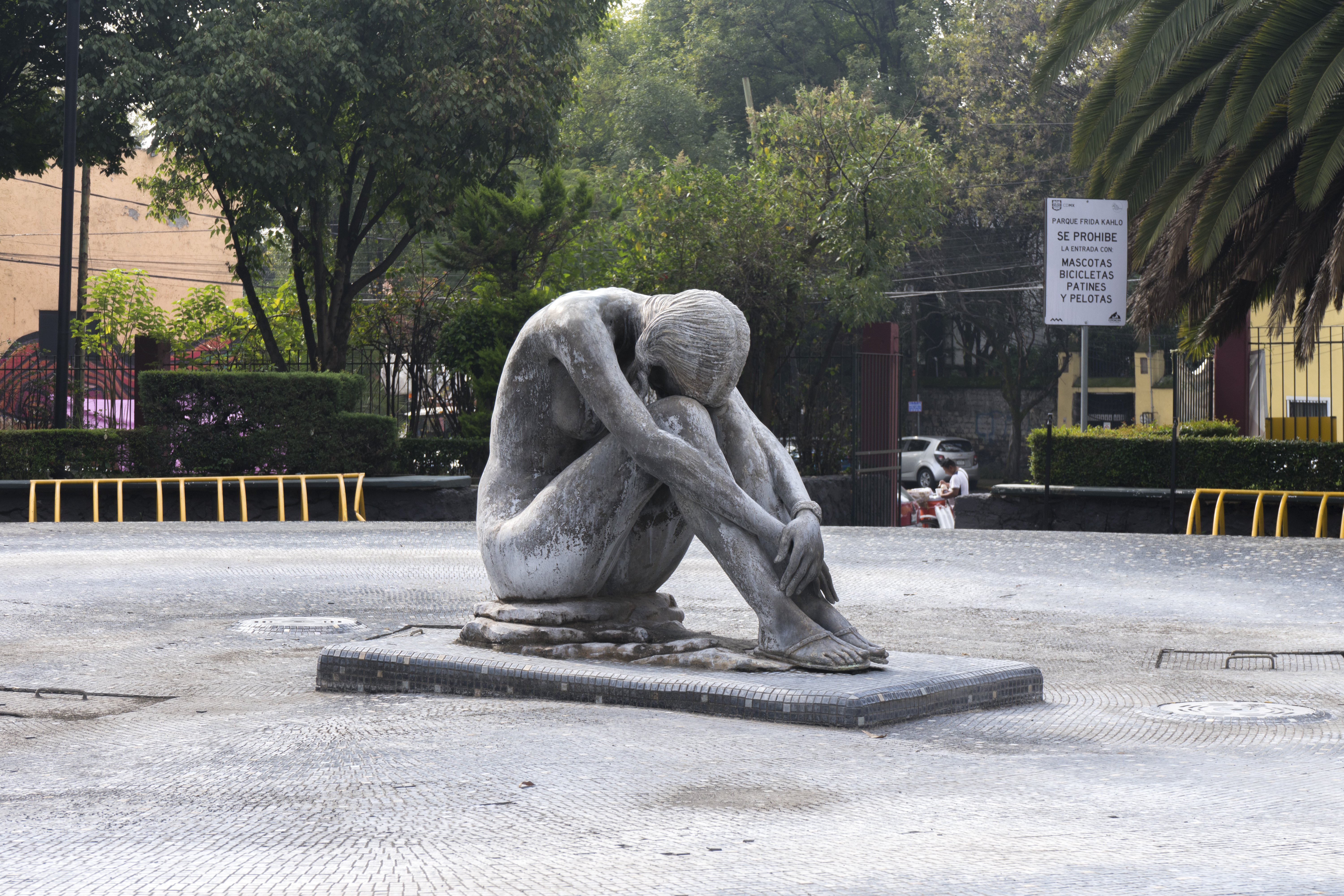 En el centro del lugar, se encuentra una fuente con una escultura de una mujer sentada, abrazando sus piernas.